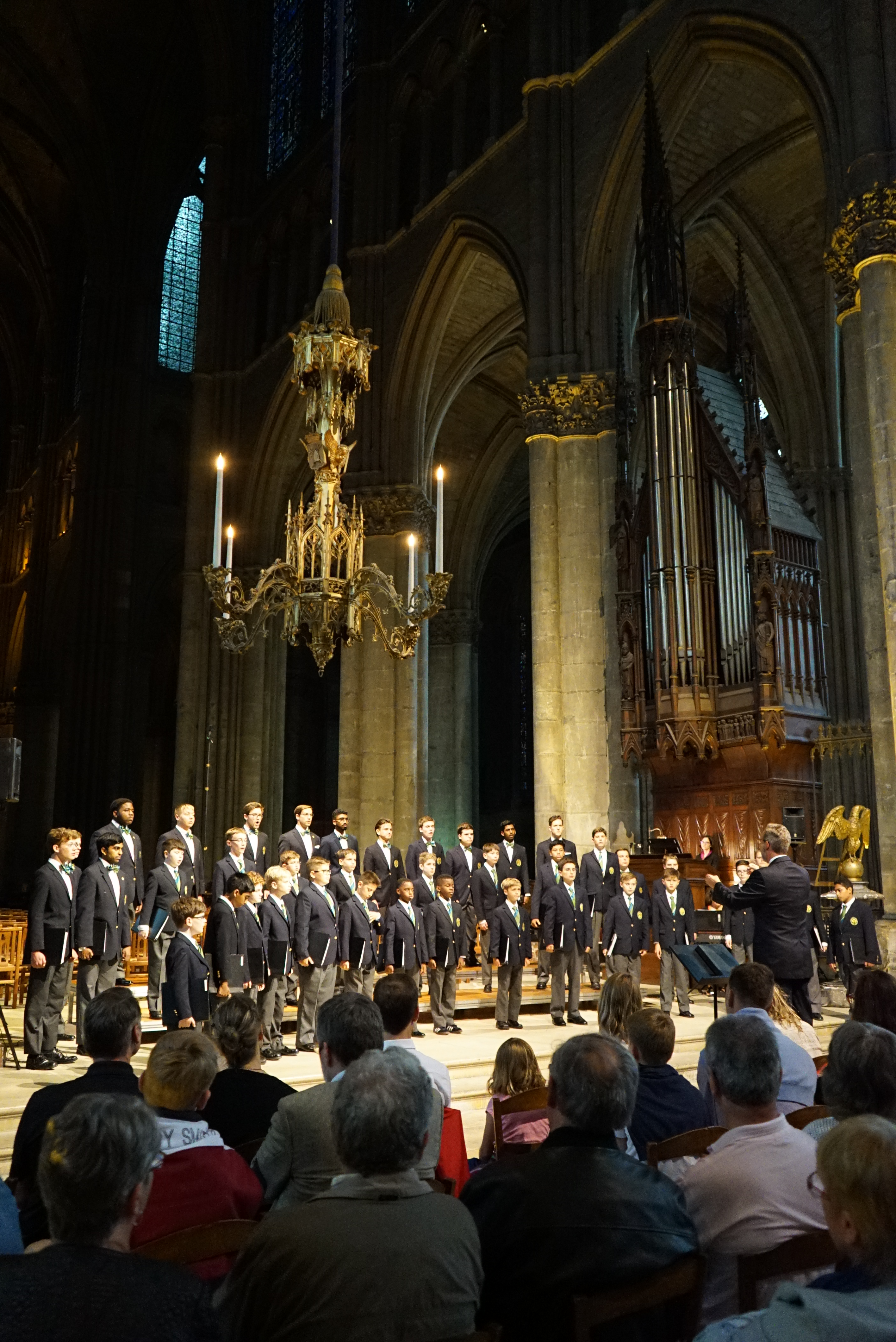 en concert à Reims.